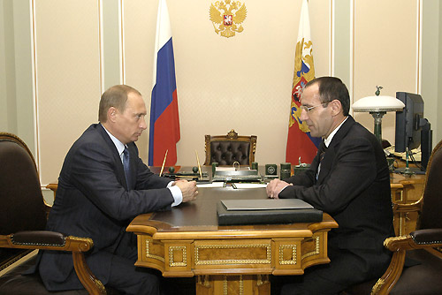 Ново-Огарево. Рабочая встреча президента Российской Федерации Владимира Путина с президентом Карачаево-Черкесии Мустафой Батдыевым.